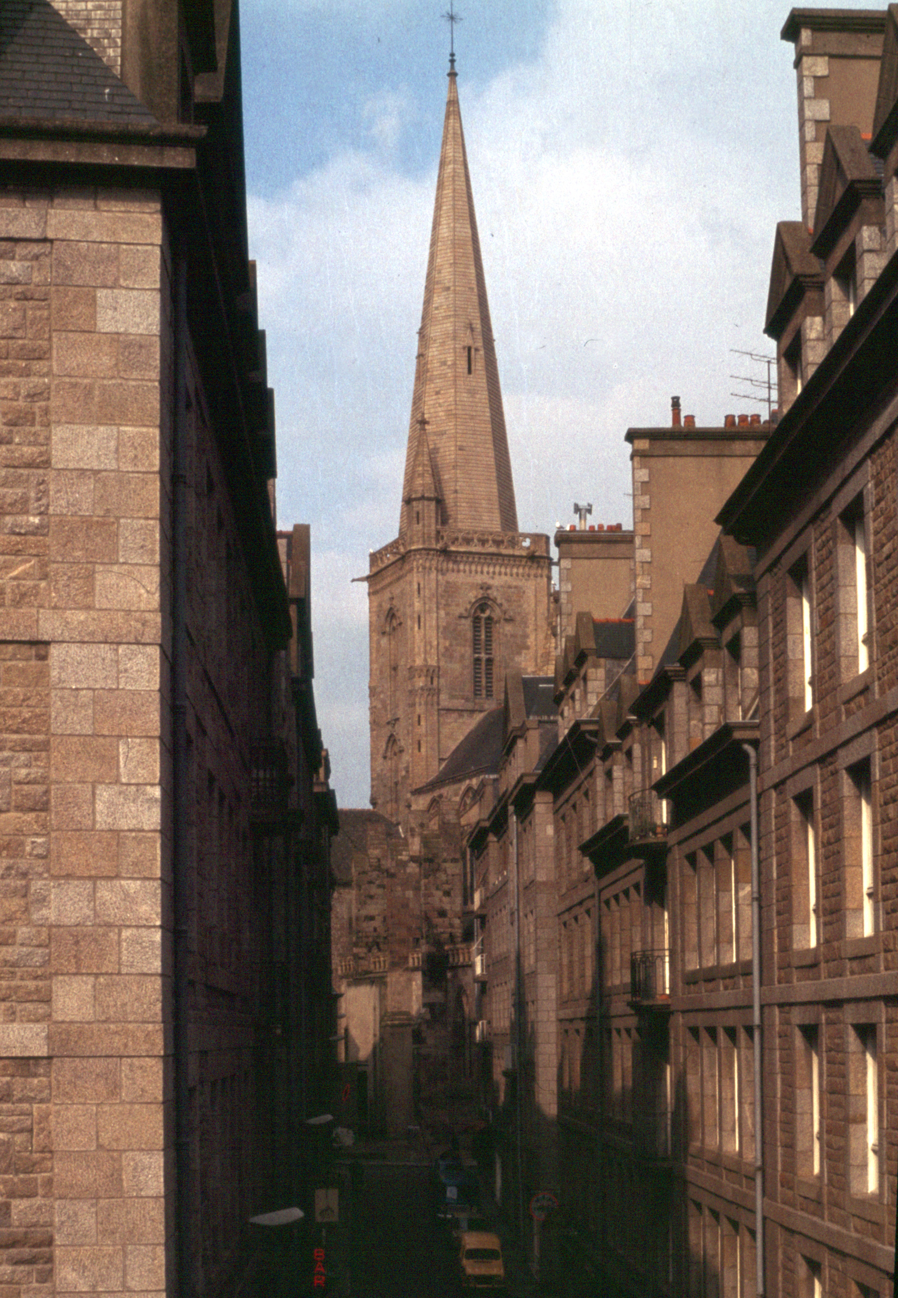 Saint-Malo 1978